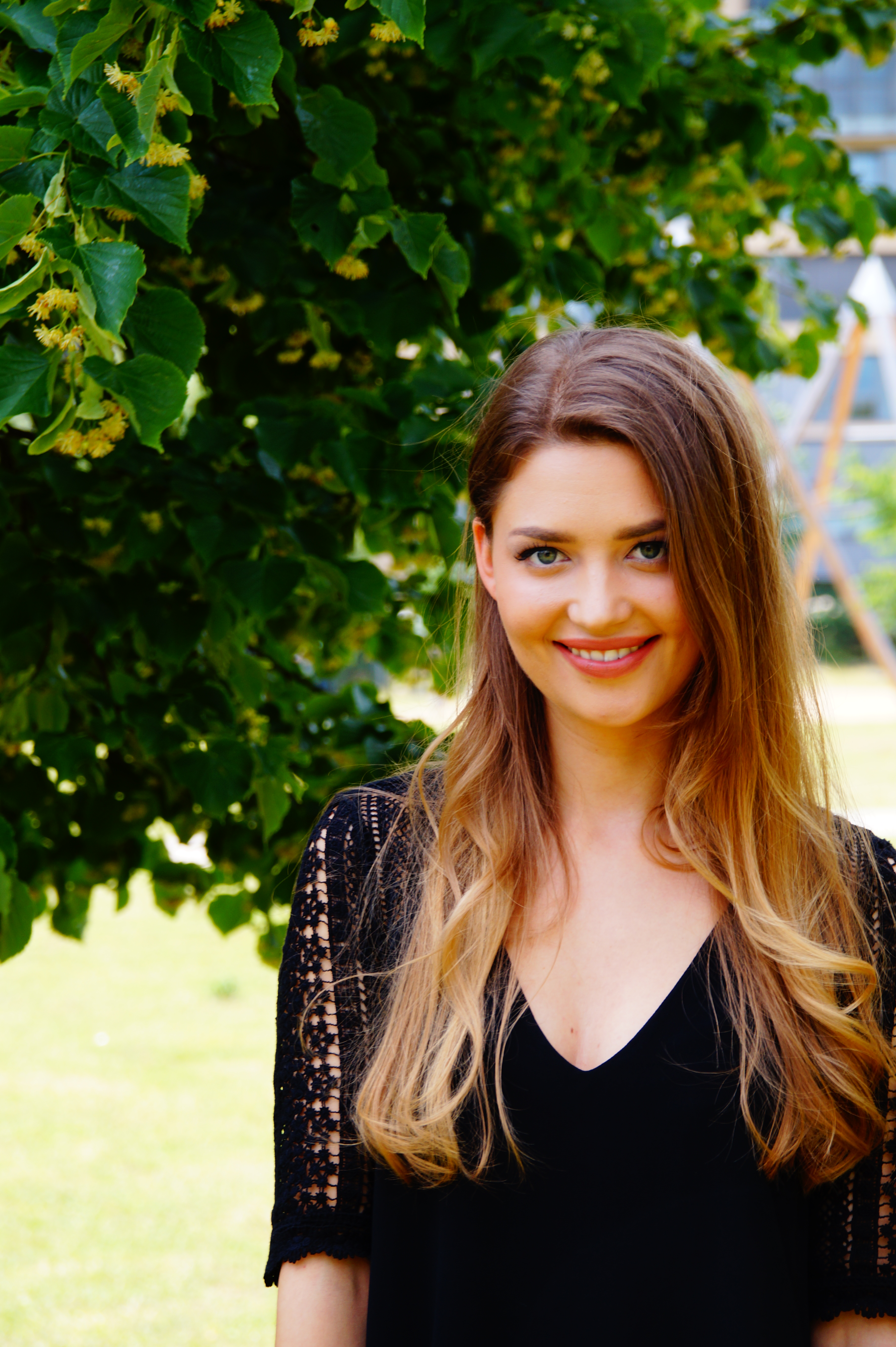 Pressetermin Comedy-Serie „Die Kuhflüsterin" am 25. Juni 2015 im Kölner Filmhaus